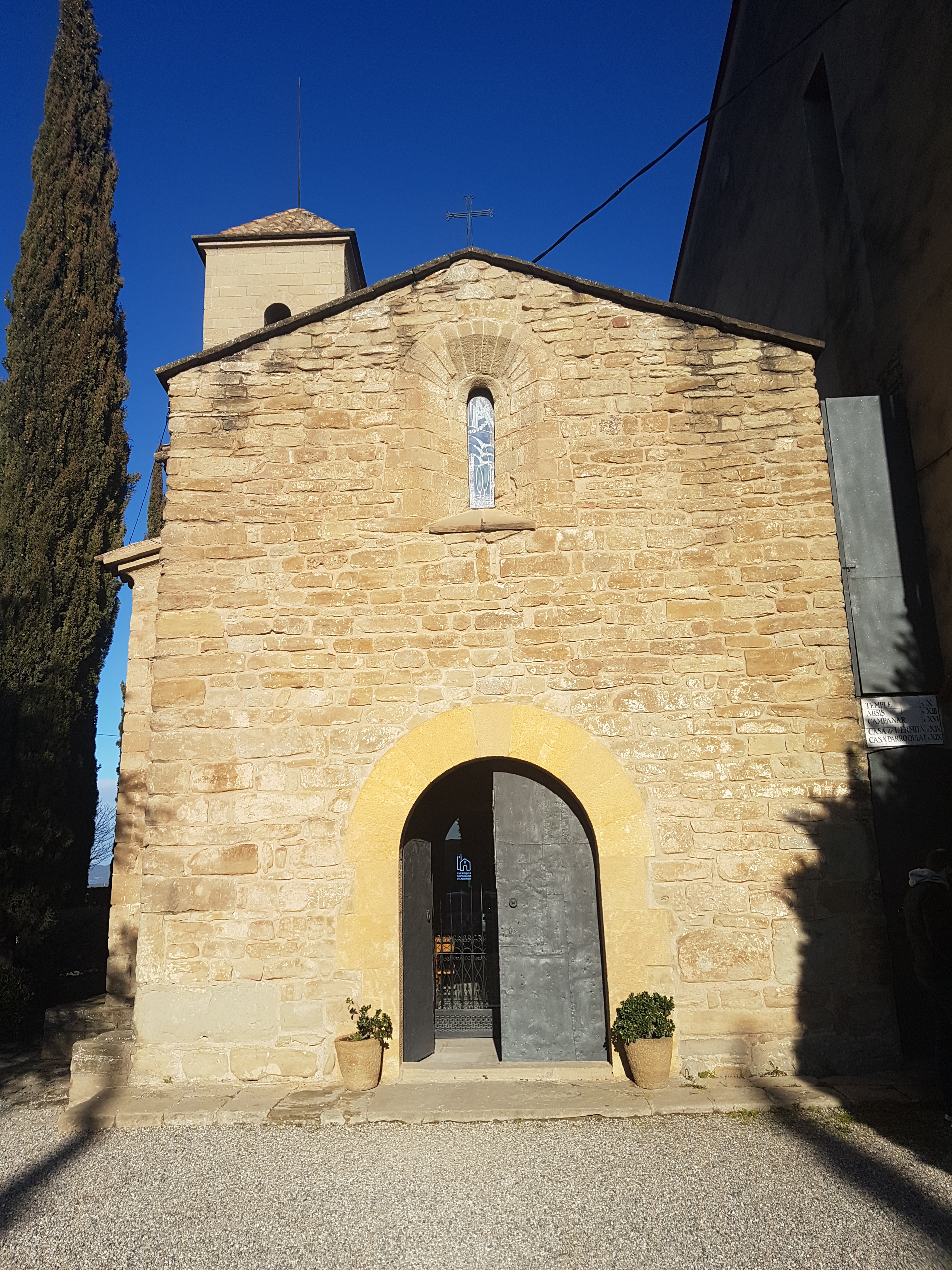 Façana